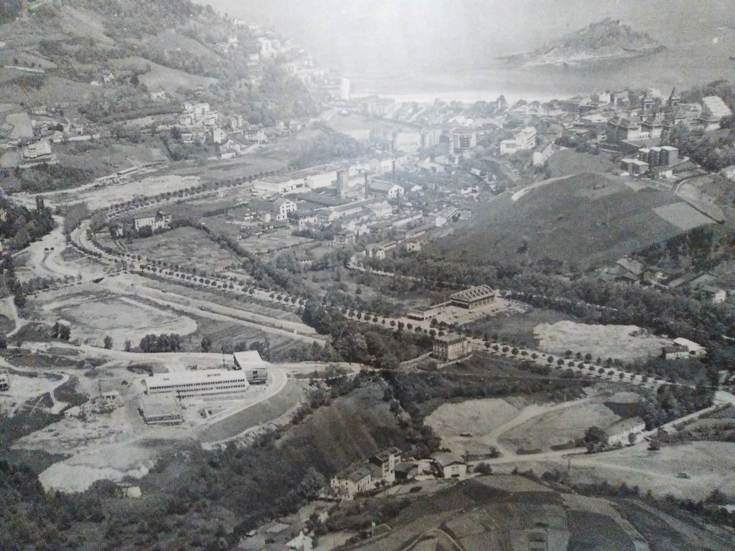 Gaur egun Benta Berri, Antigua eta Ibaeta auzoak dauden antzinako argazkia, Lugaritz Kultur-Etxean ikusgai. Donostia, Euskal Herria.